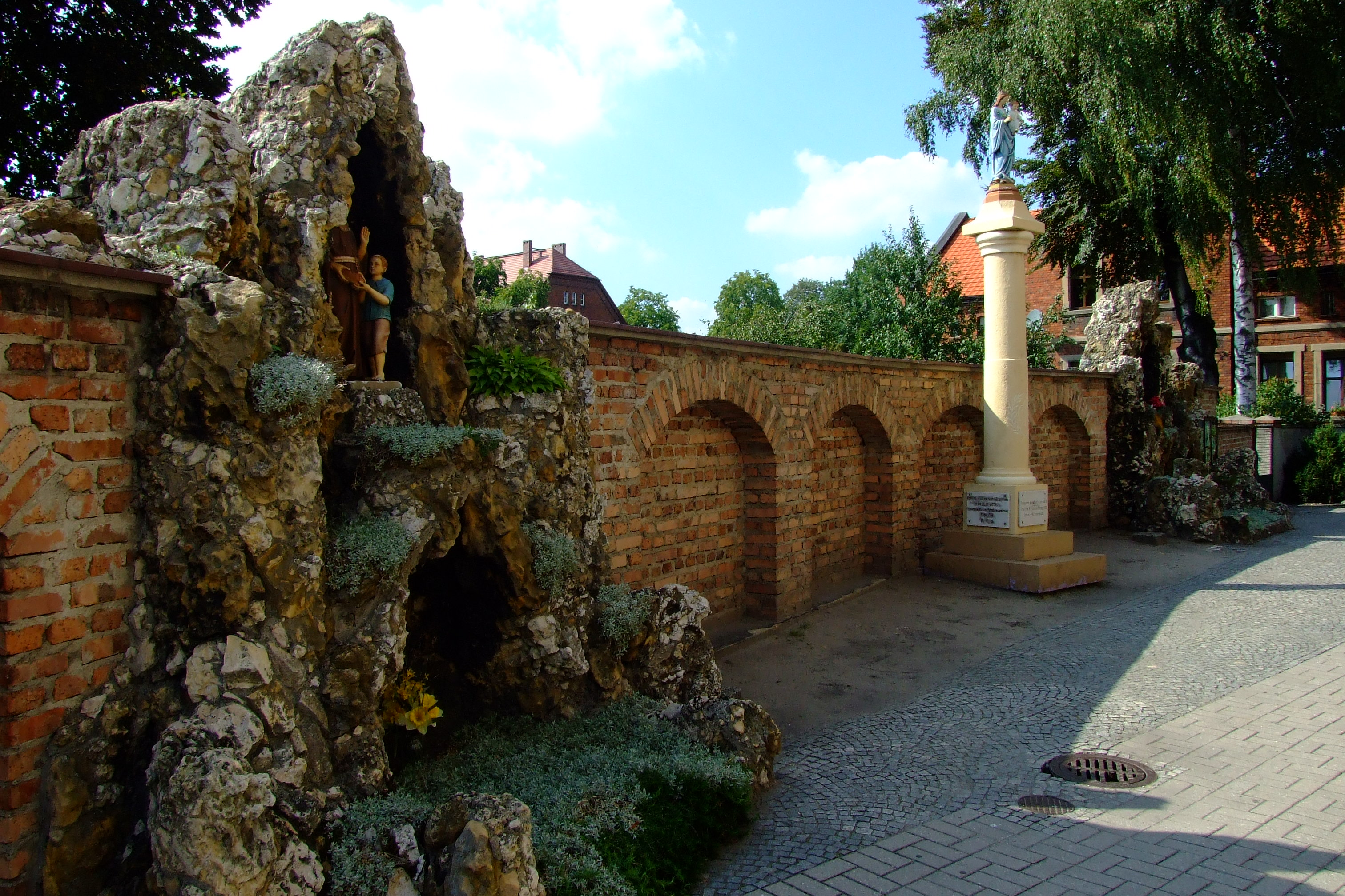 Obejście kościoła św. Mikołaja w Pyskowicach